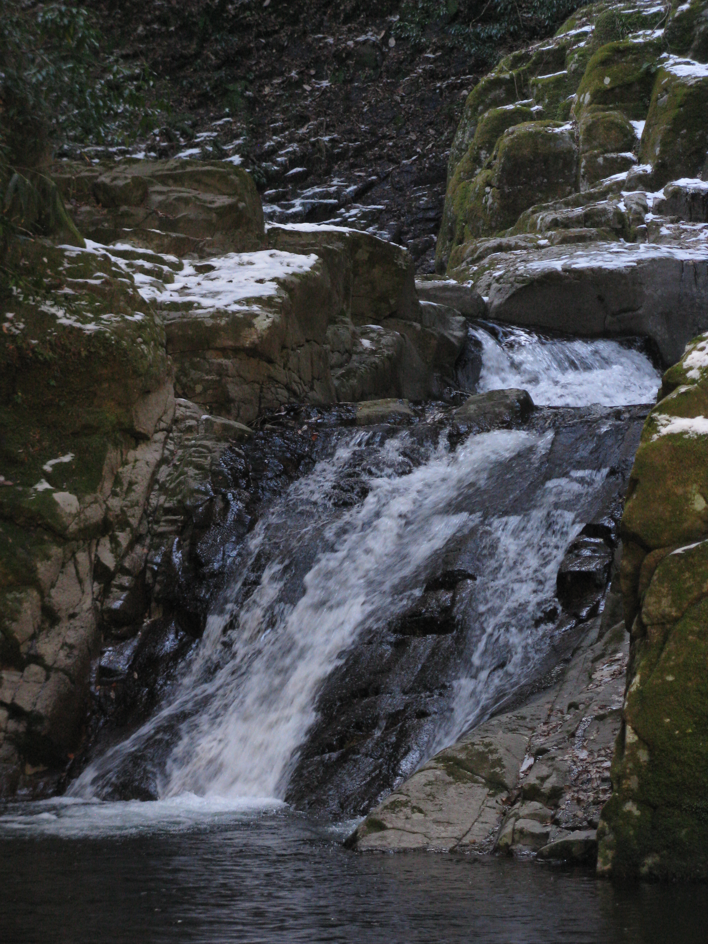 赤目四十八滝の霊蛇滝